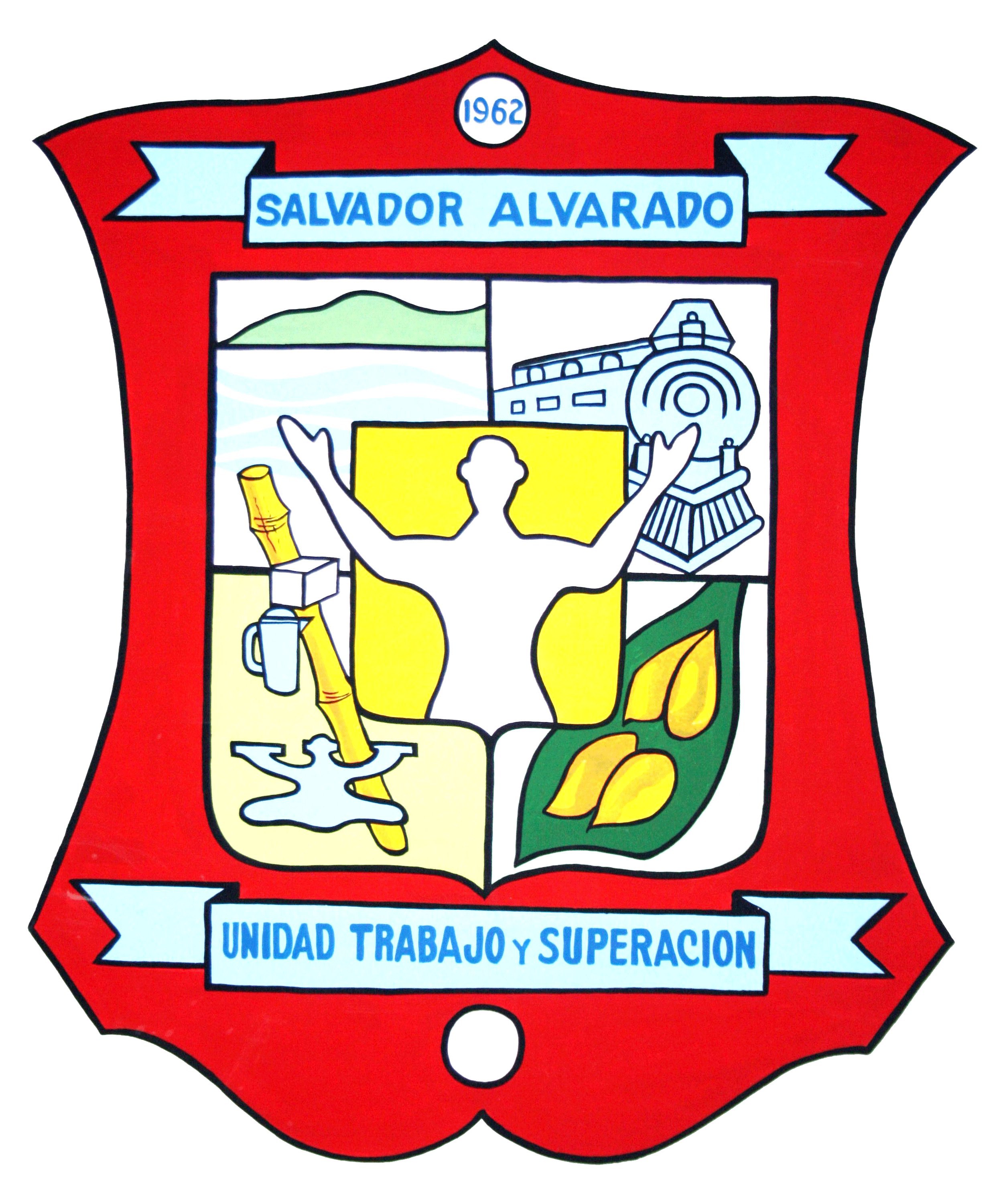 Escudo Salvador Alvarado.